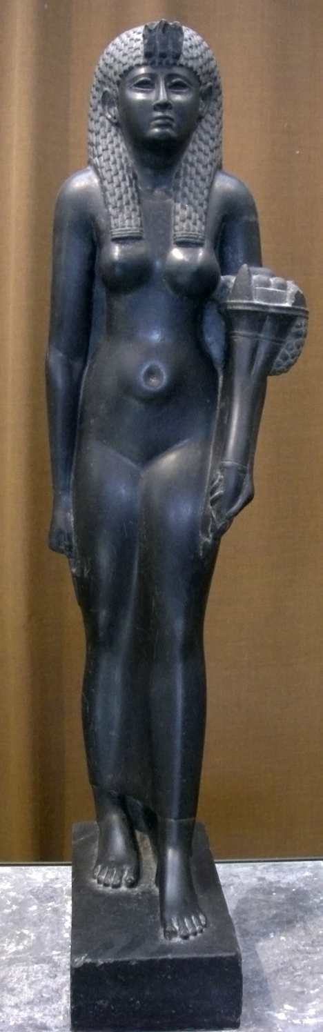 Статуя царицы Клеопатры VII. Базальт. Вторая половина I в. до н.э. Эрмитаж. Санкт-Петербург.